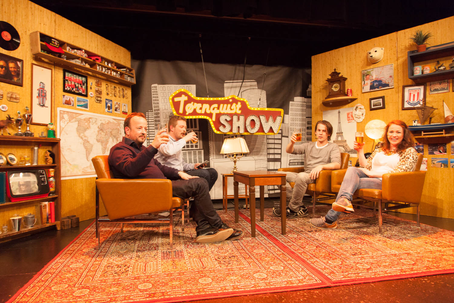 Tørnquist Show på Nordiske Mediedager i Bergen 2013. Foto : Kjetil Greger Pedersen